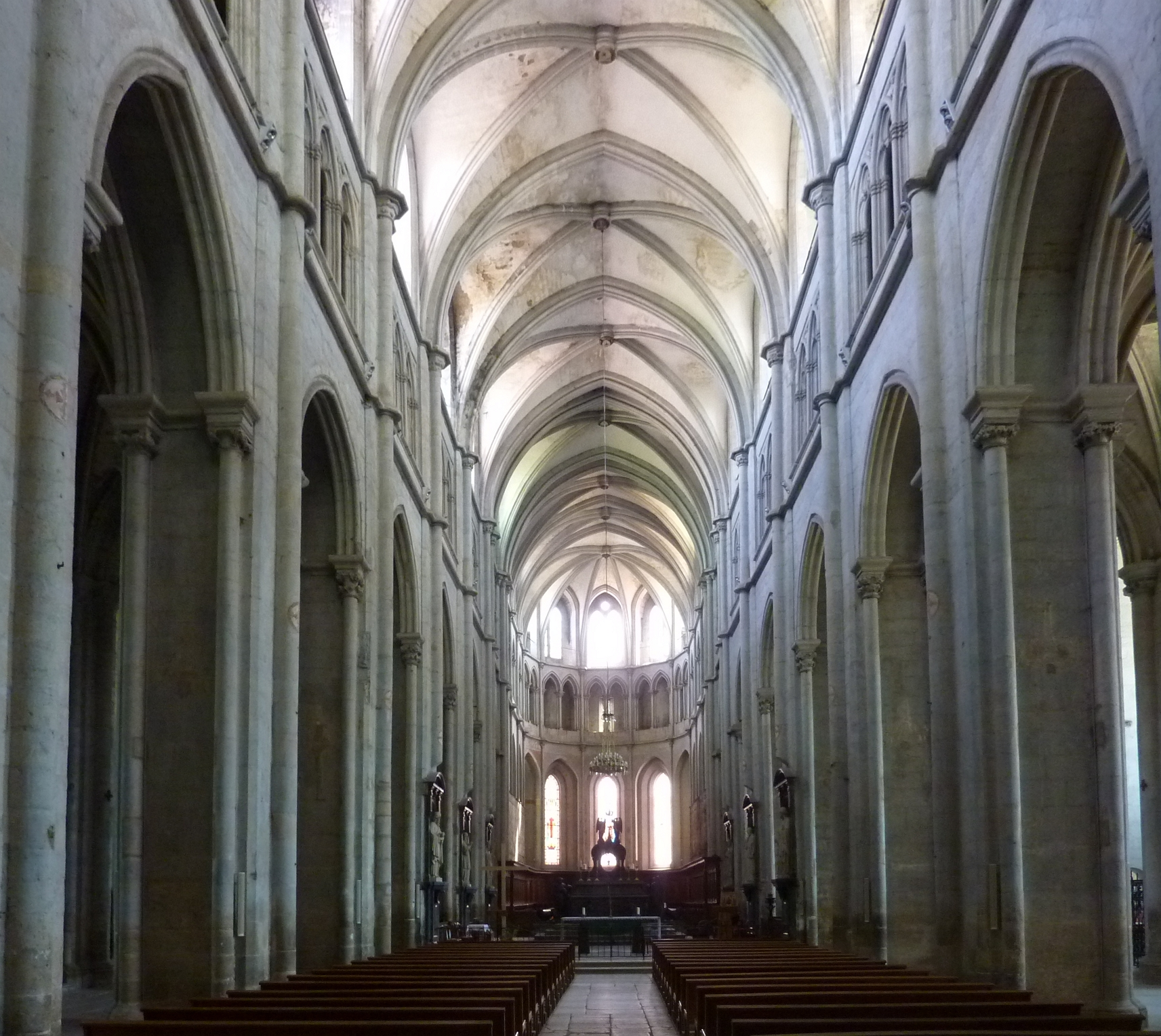 Intérieur de l'abbatiale de Saint-Antoine-l'Abbaye